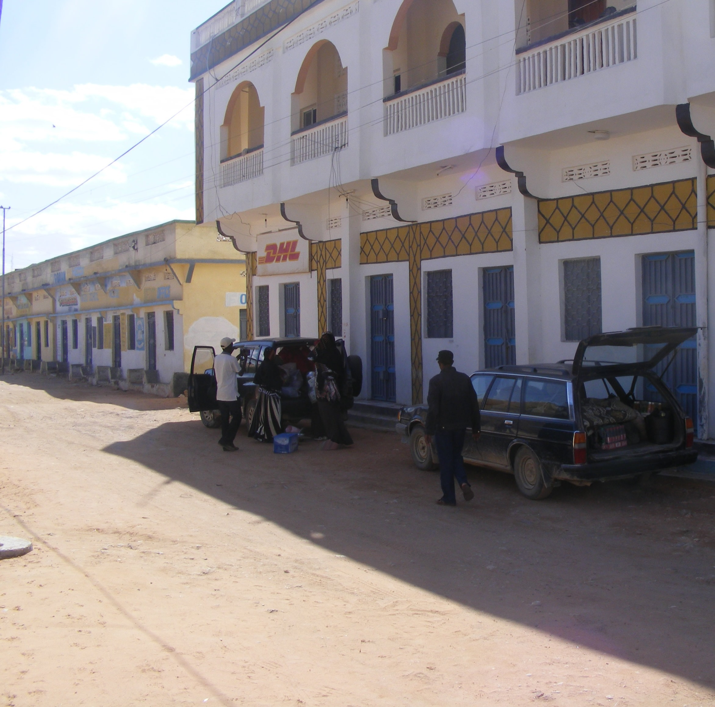 RX Center